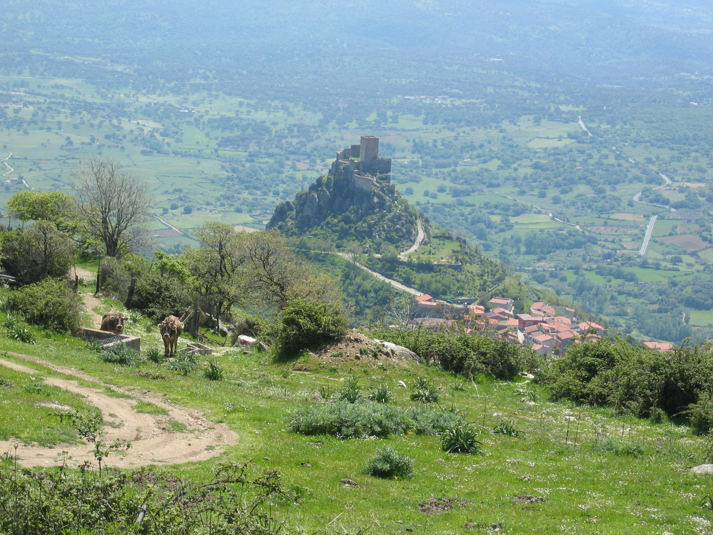 Panorama di Burgos